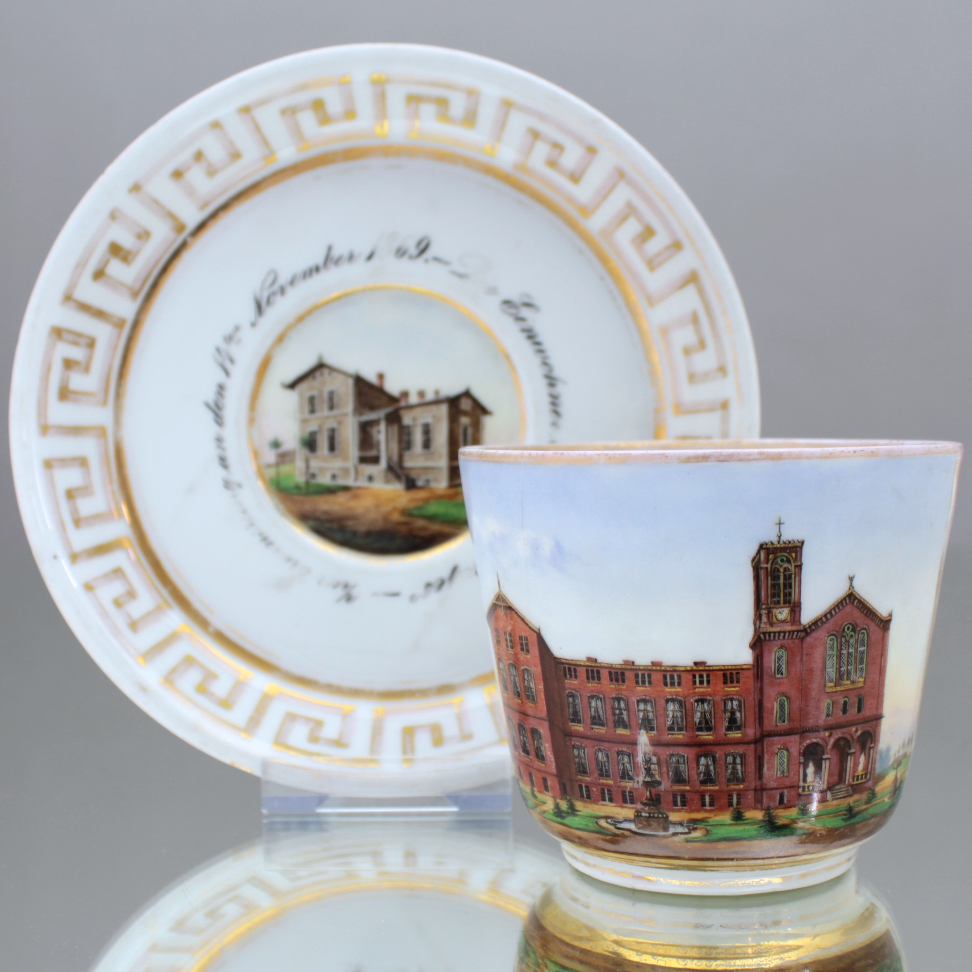 Erinnerungstasse mit dem Bild des Diakonissenhauses "Bethanien" in Stettin, Untere mit Widmung: "Zur Erinnerung an den 14ten November 1869 - Die Einwohner des Pfarrhauses"